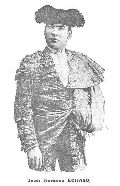 Juan Jiménez, Ecijano. "El Enano", Madrid, 10 de diciembre de 1899. Biblioteca Nacional de España.